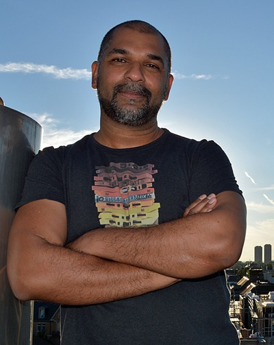 Buchautor Sunil Mann